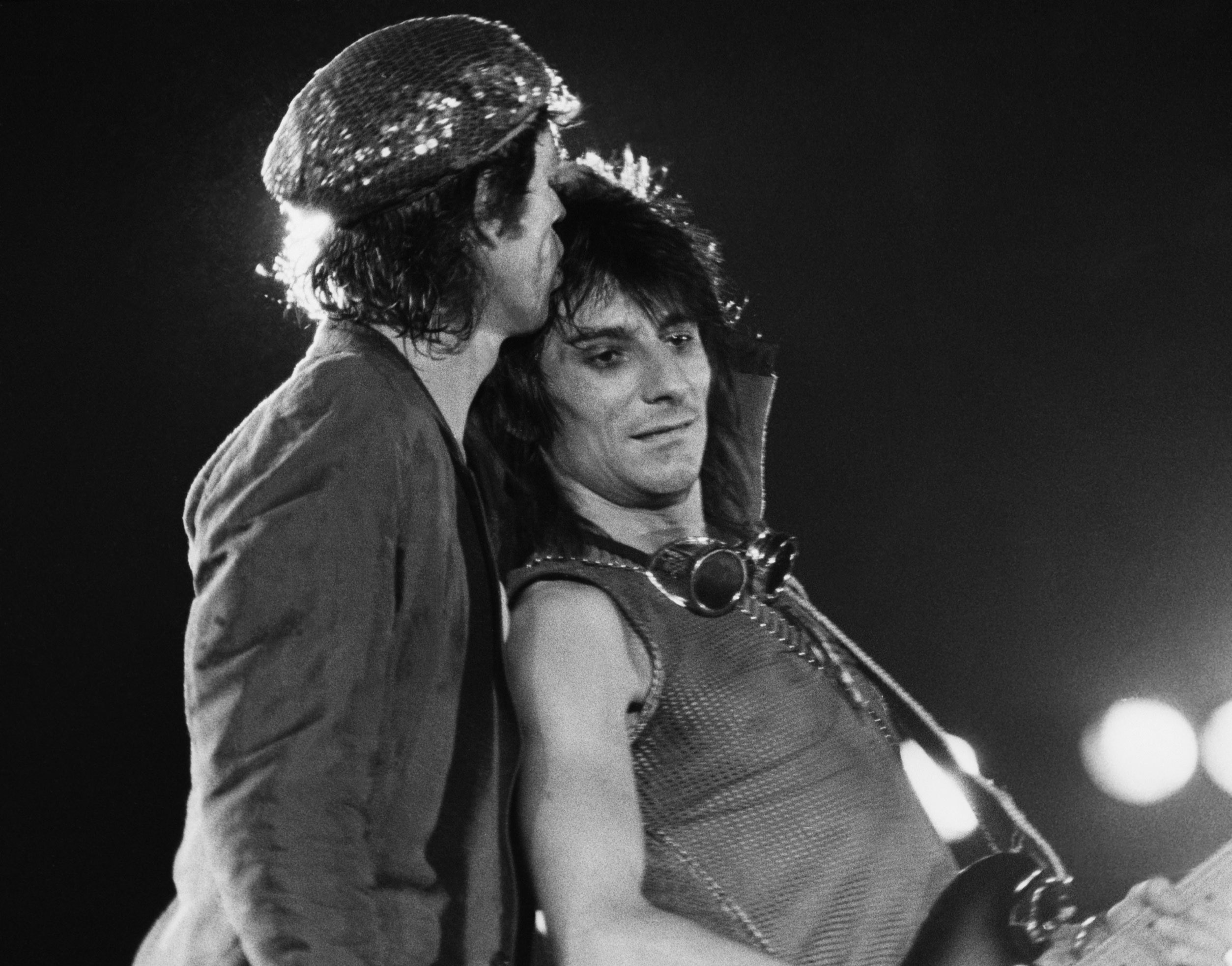 Concerto dei Rolling Stones a Torino, 1982, Mick Jagger e Ron Wood